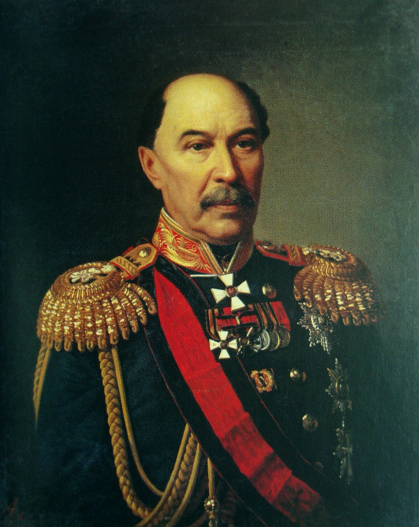 Тюрин Иван Алексеевич - Портрет адмирала Фёдора Михайловича Новосильского